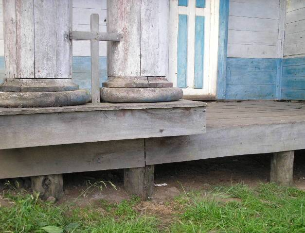 Vista de la base de los pilares del pórtico y las fundaciones de la iglesia Nuestra Señora de Gracias de Nercón, Castro, Chiloé, Chile.